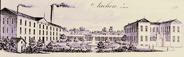 Zeichnung der Tuchfabrik Kelleter im Wylreschen Hof an der Jacobstraße in Aachen um 1808